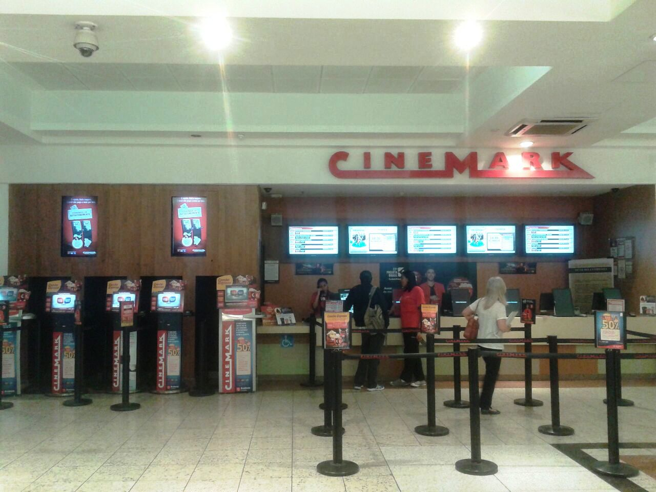 Bilheteria do Cinemark Pátio Savassi de Belo Horizonte, MG